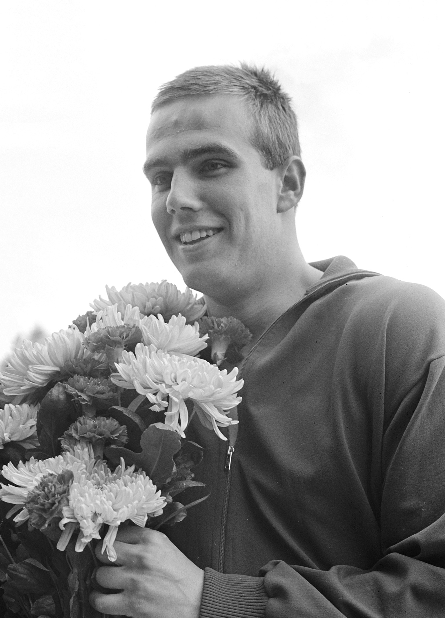 Nederlandse zwemkampioenschappen, Hemmie Vriens